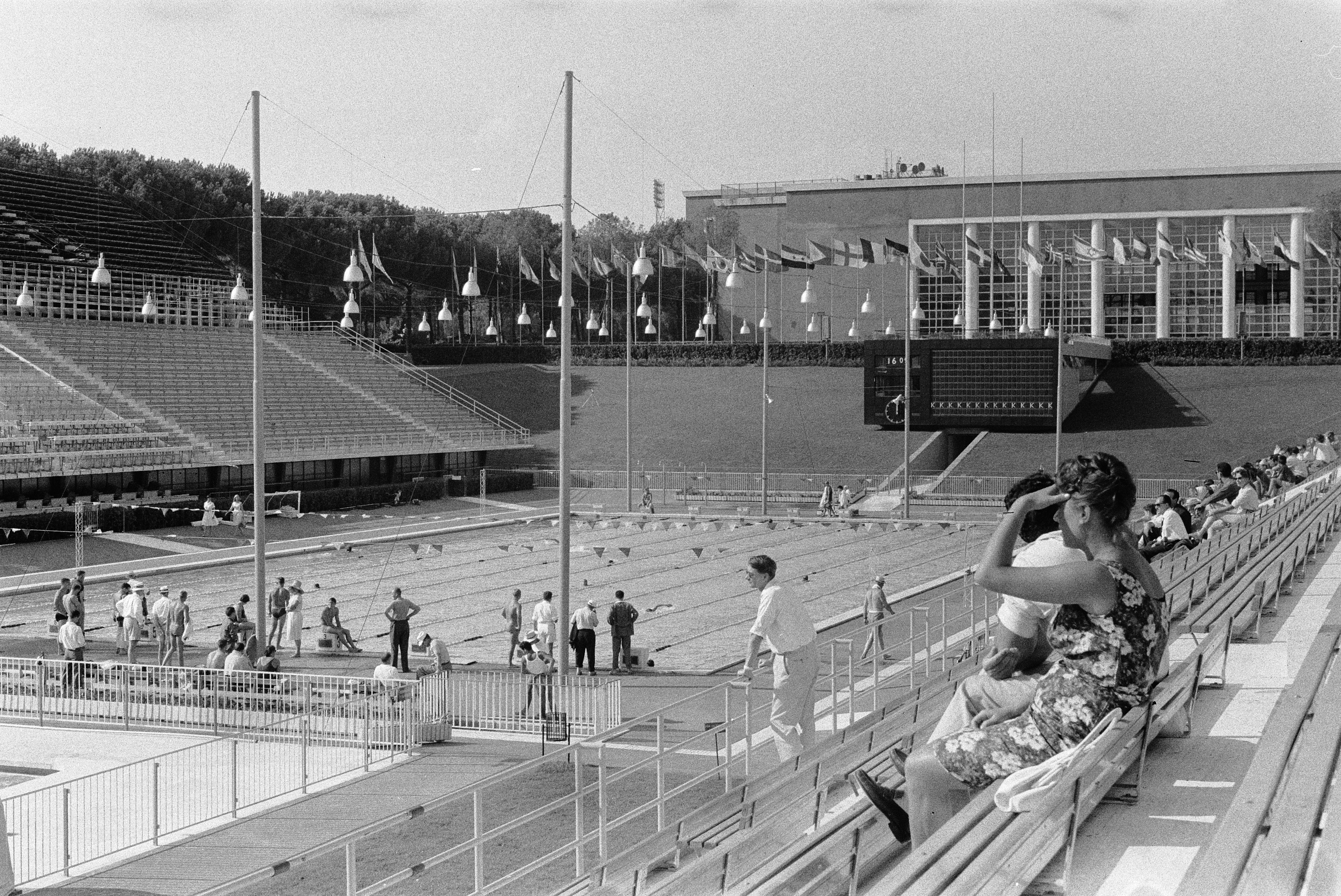 Collectie / Archief : Fotocollectie Anefo Reportage / Serie : [ onbekend ] Beschrijving : Olympische Spelen te Rome, training in het Olympisch zwembad Datum : 22 augustus 1960 Locatie : Rome Trefwoorden : sport, zwembaden Fotograaf : Pot, Harry / Anefo Auteursrechthebbende : Nationaal Archief Materiaalsoort : Negatief (zwart/wit) Nummer archiefinventaris : bekijk toegang 2.24.01.05 Bestanddeelnummer : 911-5225